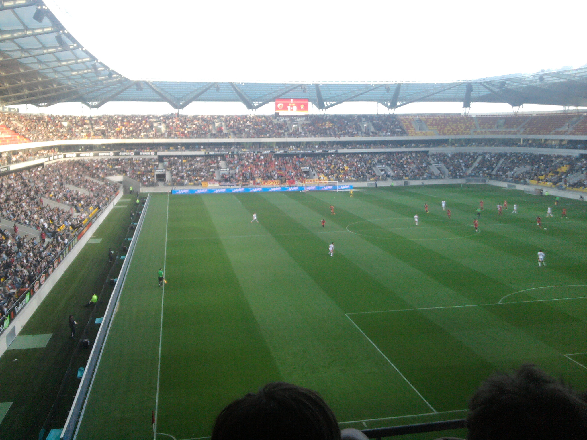 Rencontre entre Le Mans FC et le stade Lavallois au stade MMArena du Mans. France. Ligue 2.